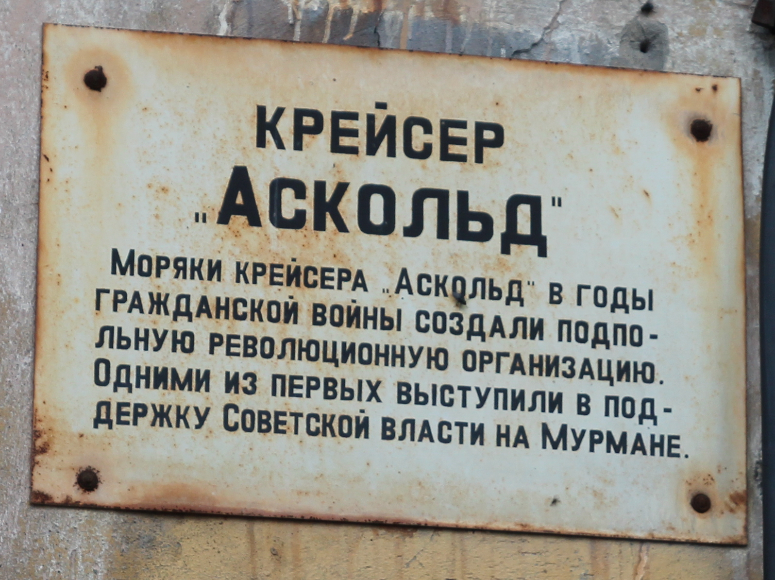 Мемориальная доска крейсеру Аскольд.jpg